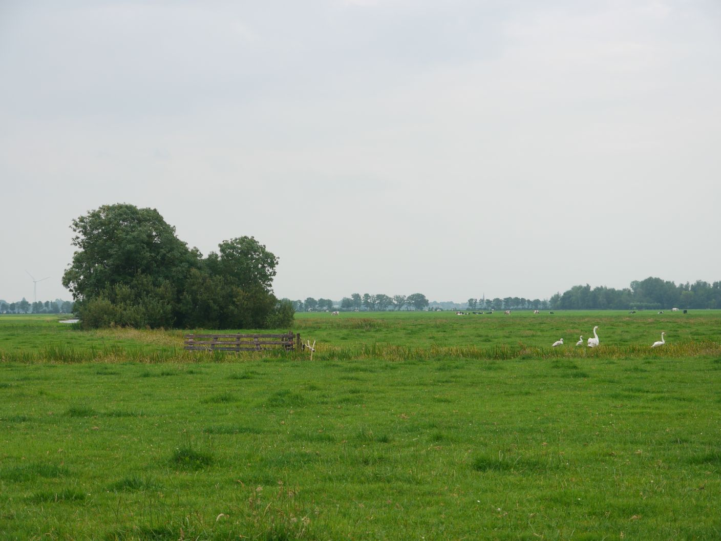 Pestbosje: bosje waar in het verleden vee werd begraven dat aan een besmettelijke ziekte was overleden. Deze foto is gemaakt in de Vlietpolder bij Ofwegen.